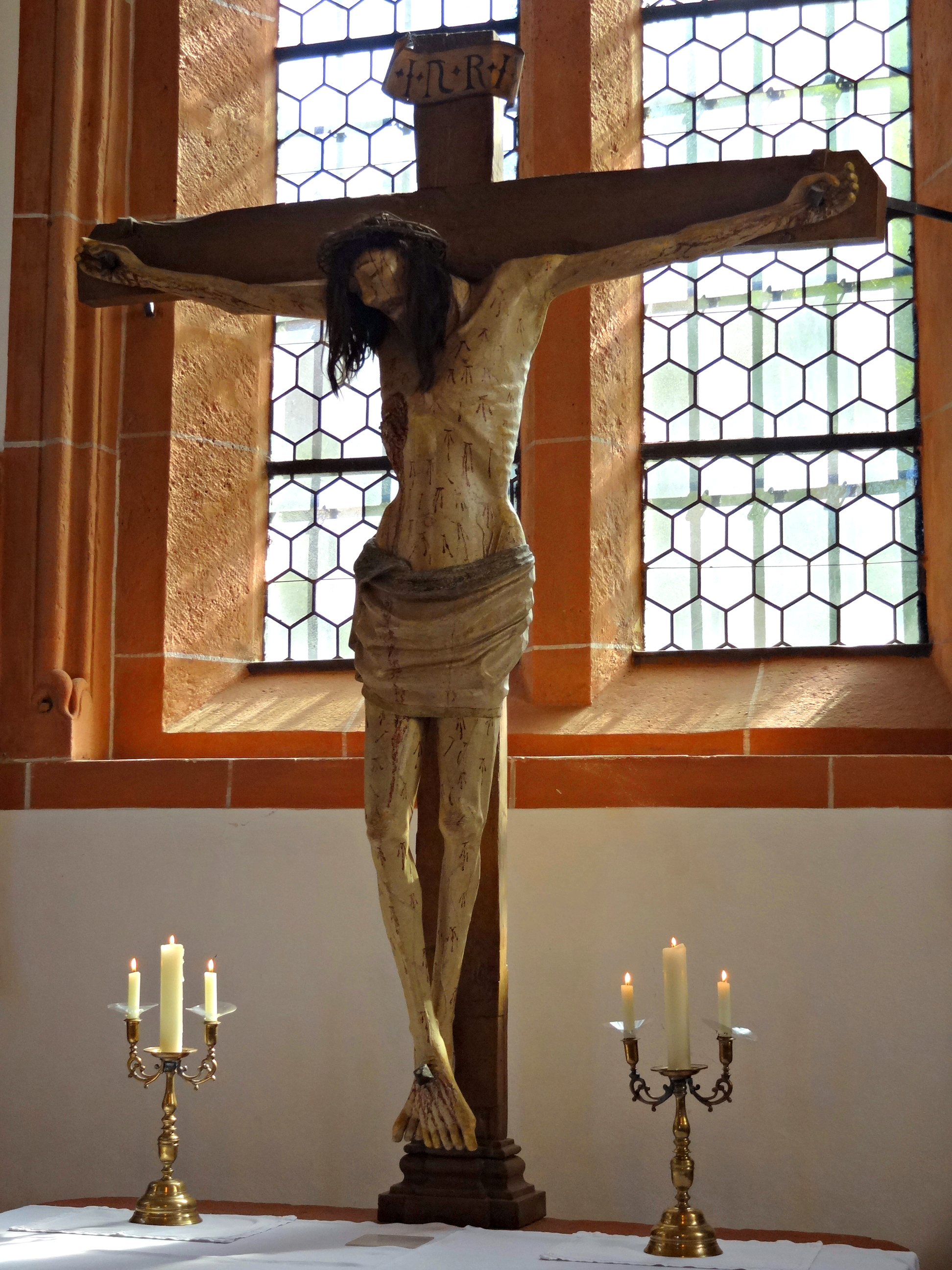 Überlebensgroßes Kruzifix, Würzburger Schule, 1431, Echthaarperücke, in der Brust Aushölung mit drei Reliquien (u.a. ein Span vom Leichenkarren der Heiligen Elisabeth), Evangelische Pfarrkirche Münzenberg